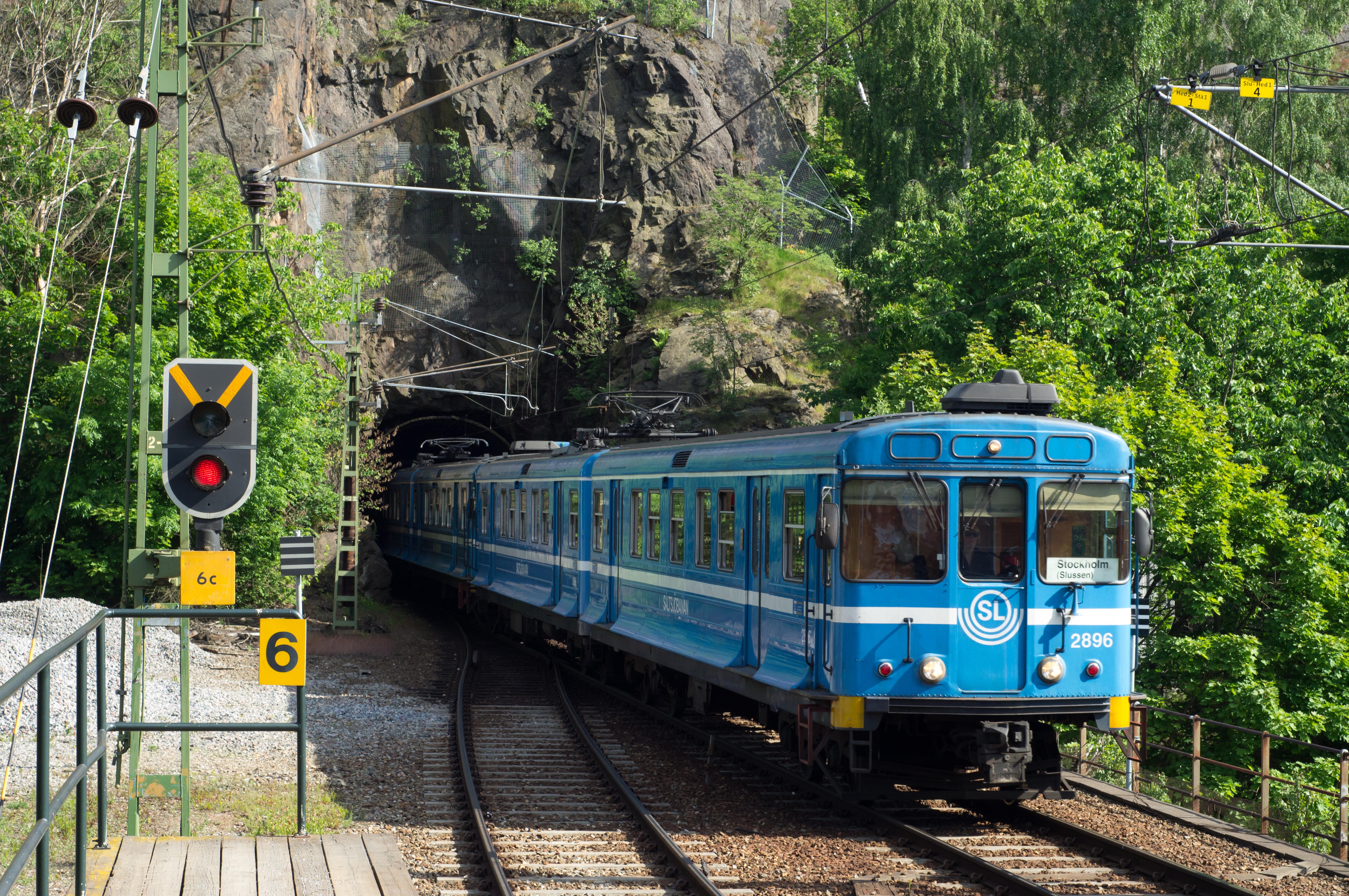 Der Zug der Saltsjöbanan verlässt gerade einen Tunnel und fährt Richtung Stockholm Slussen in den Bahnhof Henriksdal.